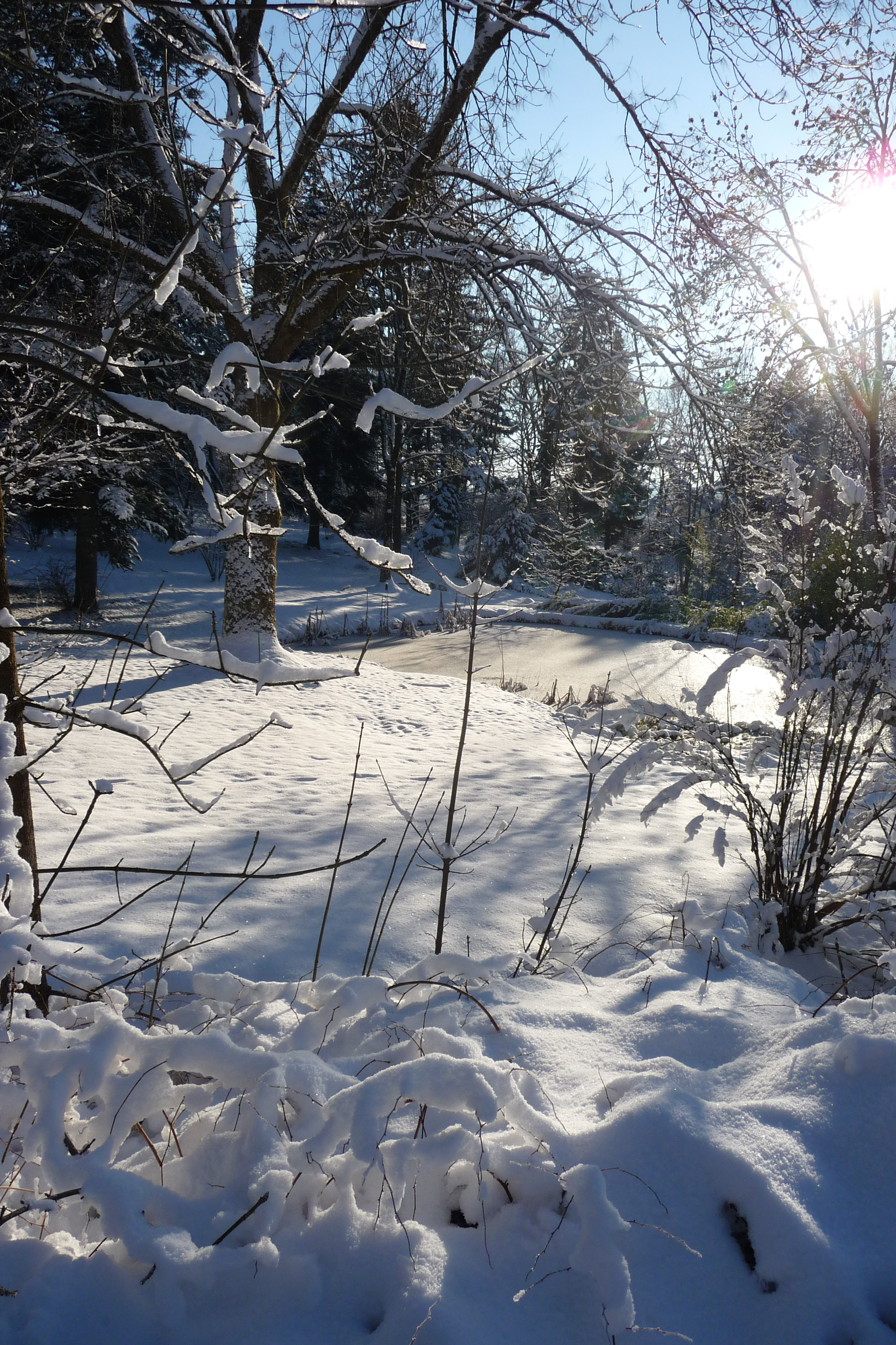 Winter 2012